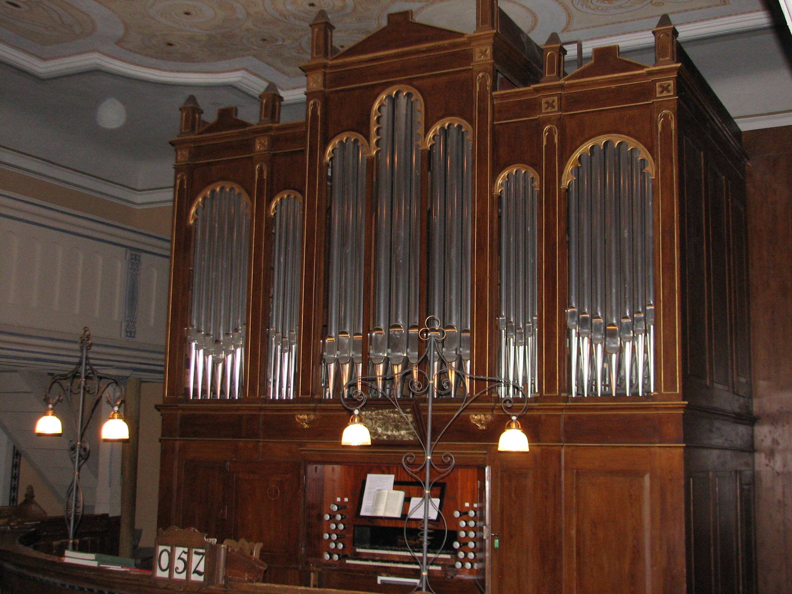 Orgel